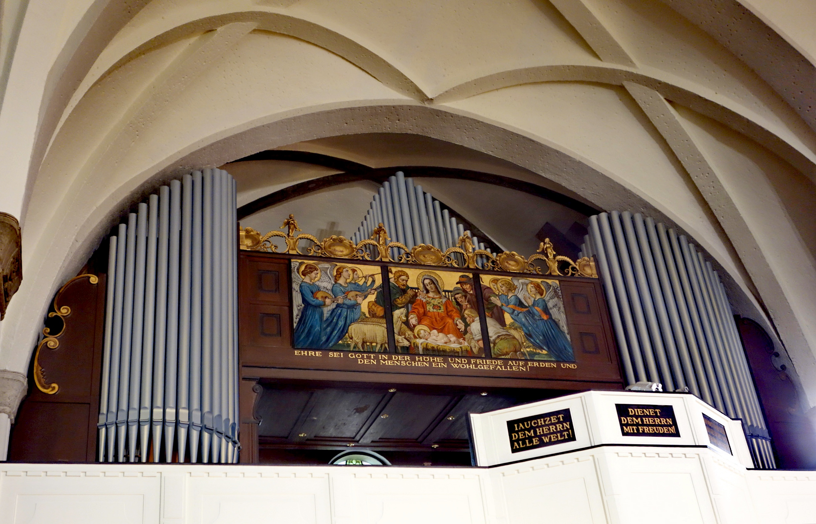 Orgel in Lübeck, St. Gertrud, Schleswig-Holstein